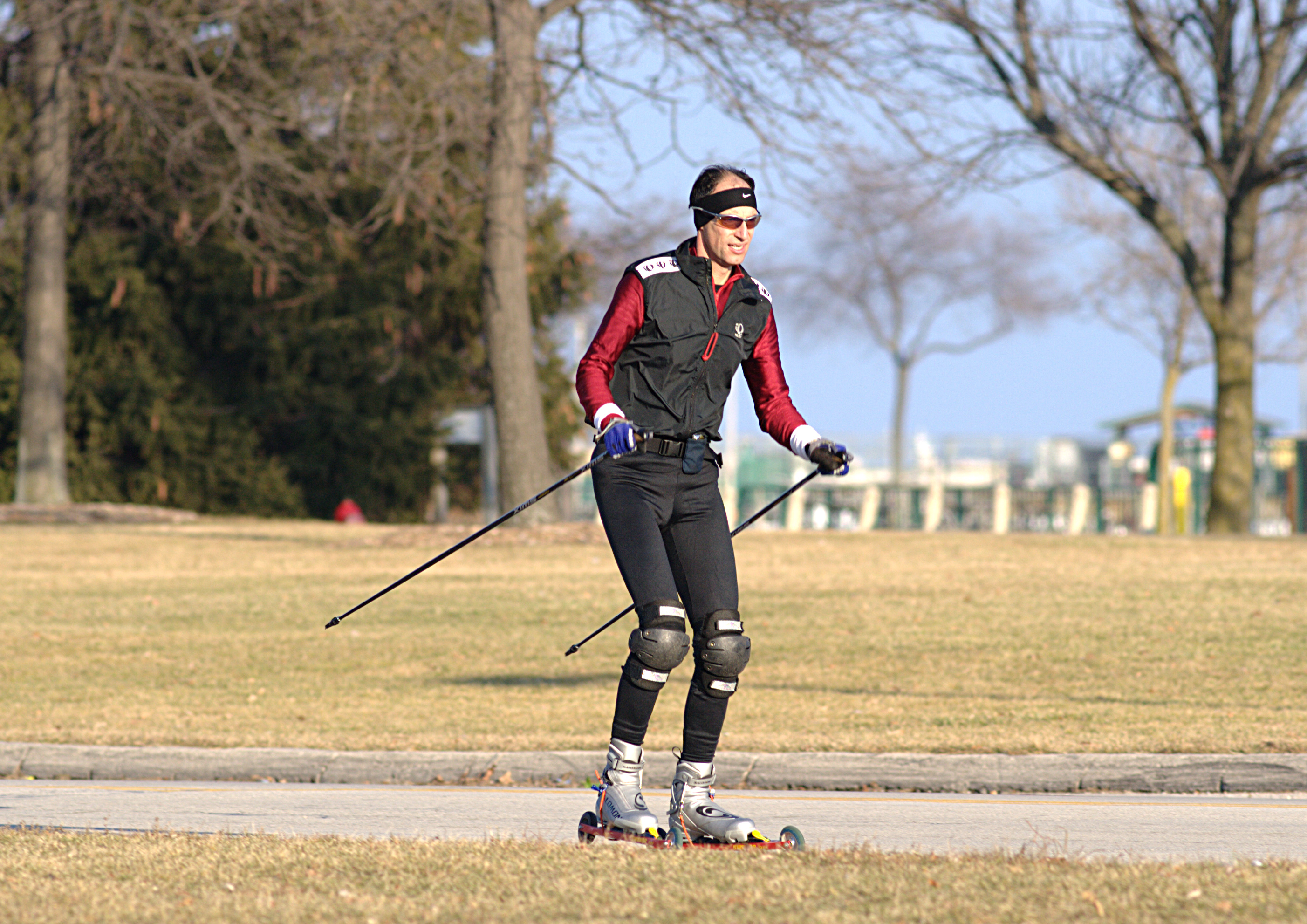 Roller Skier